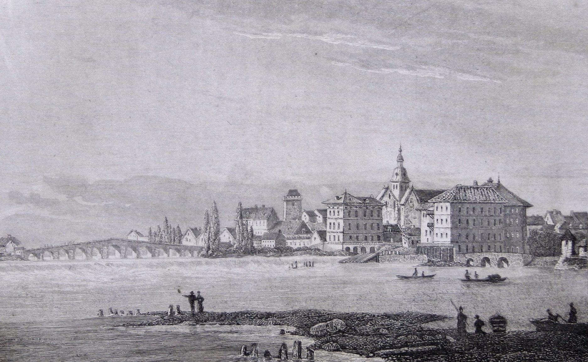 Vue de la Saône, du pont de pierres, du moulin en 1836